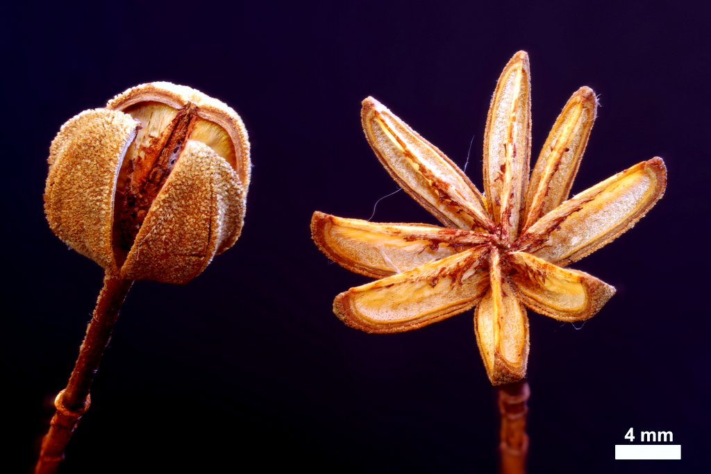 Kapseln mit Fächern aus denen die Samen schon heraus gefallen sind